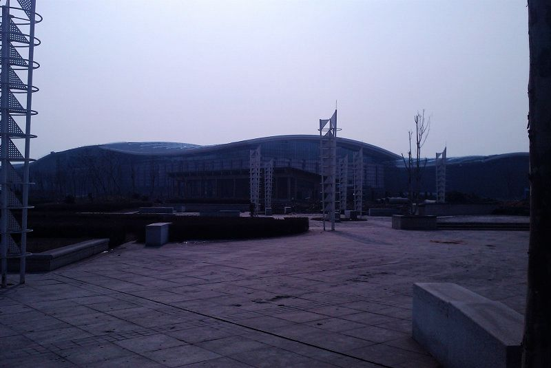 建设中的梅江国际会展中心